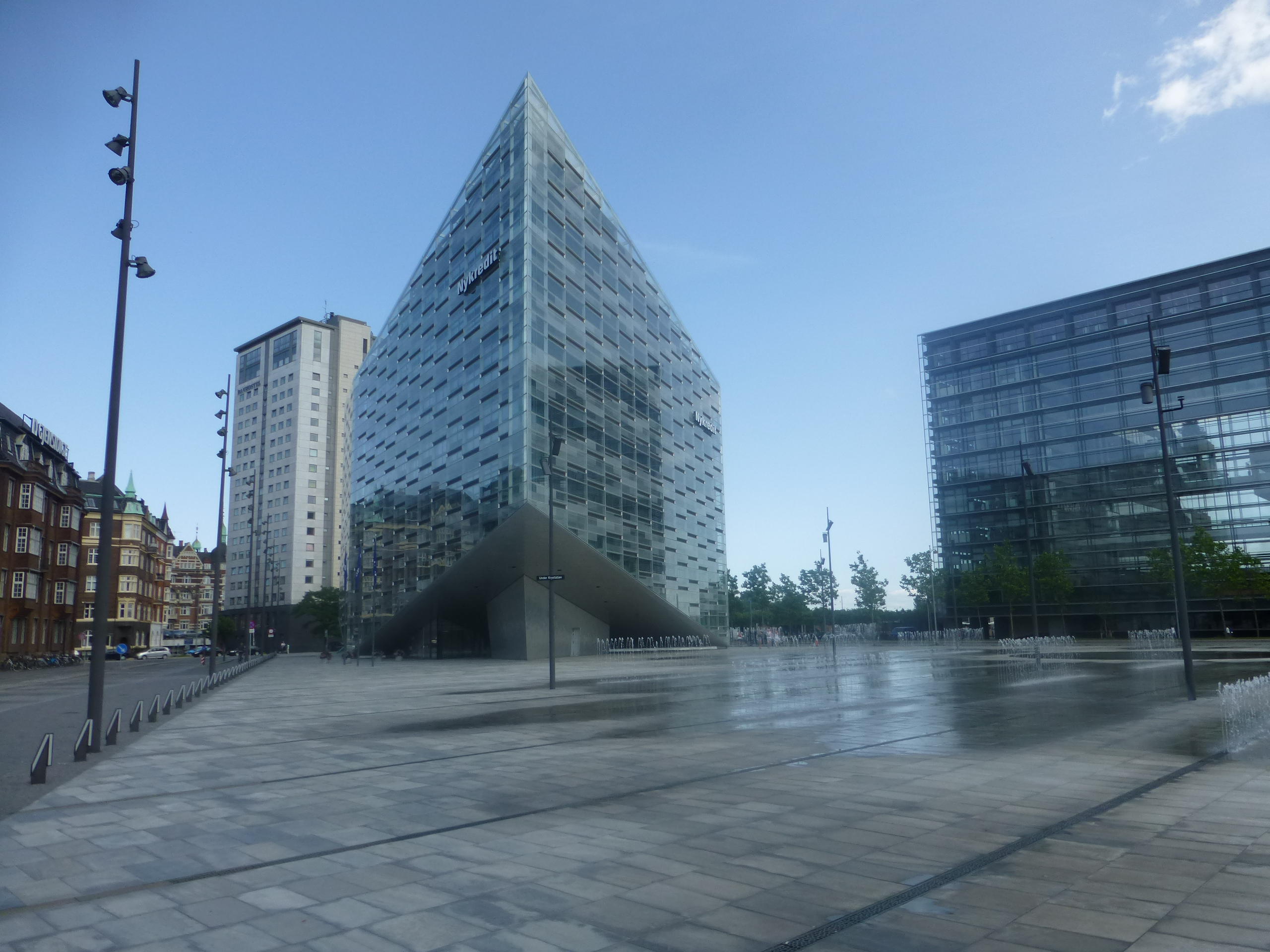 The square Under Krystallen in Vesterbro in Copenhagen.